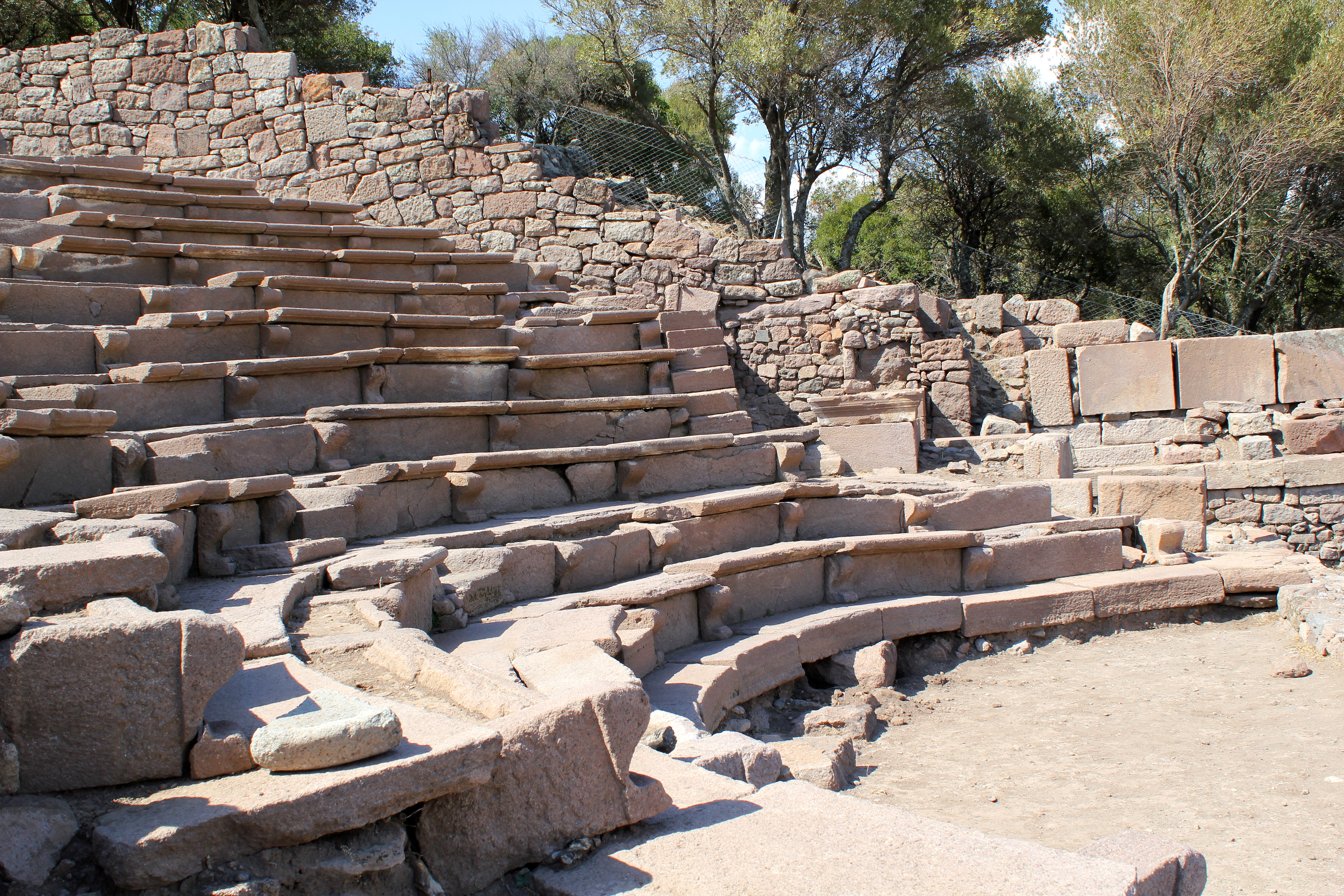 Bouleuterion in Aigai (Äolis), Westtürkei